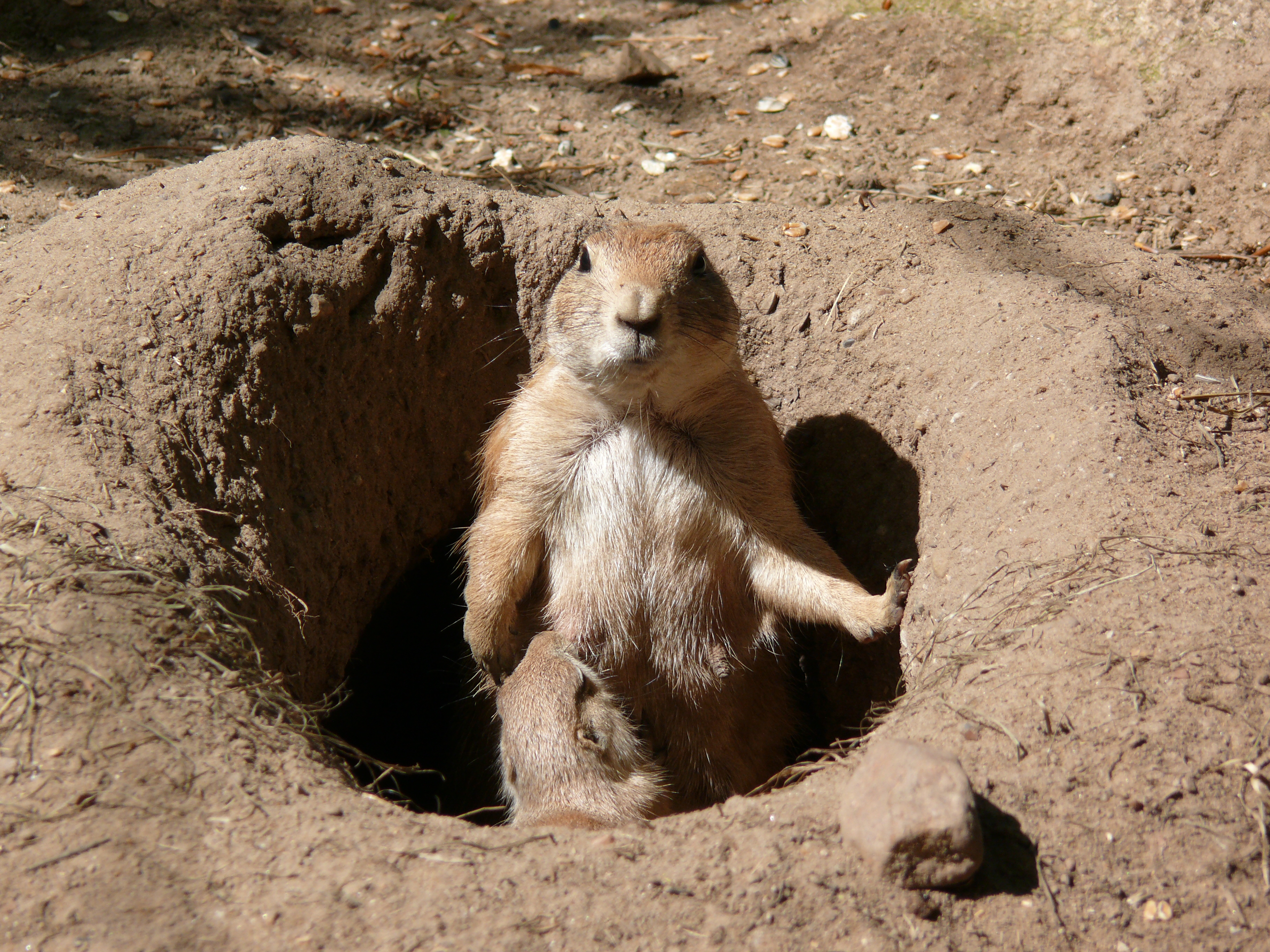 Schwarzschwanz Präriehund (Cynomys ludovicianus)